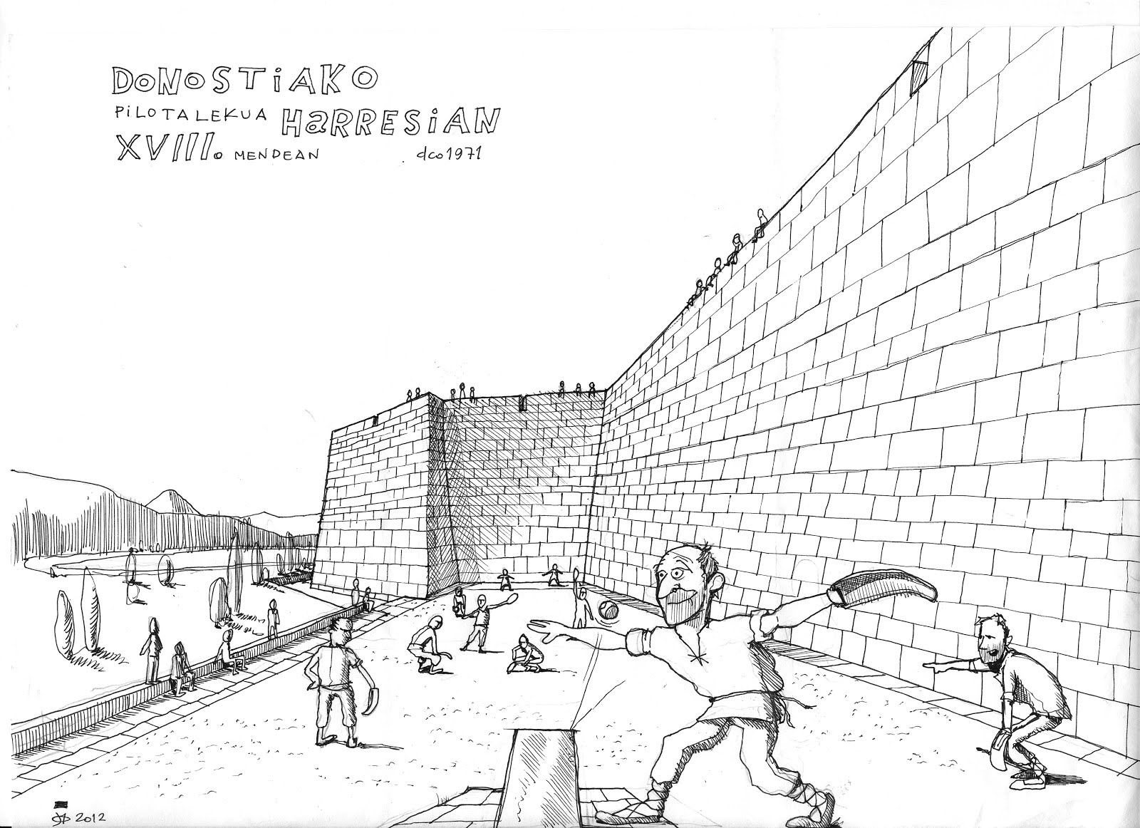 Daniel Carballo Ostolaza ren eskuz marraztutako irudia da. Bertan, Donostiako harresian Guante laxoa pilota jokoa (luzean) irudikatzen da.